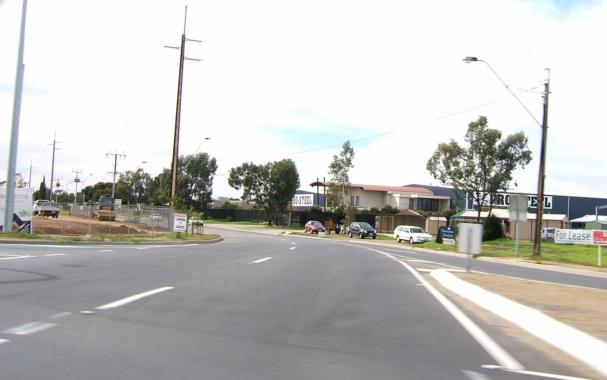 Martins Rd, Greenfields, Adelaide